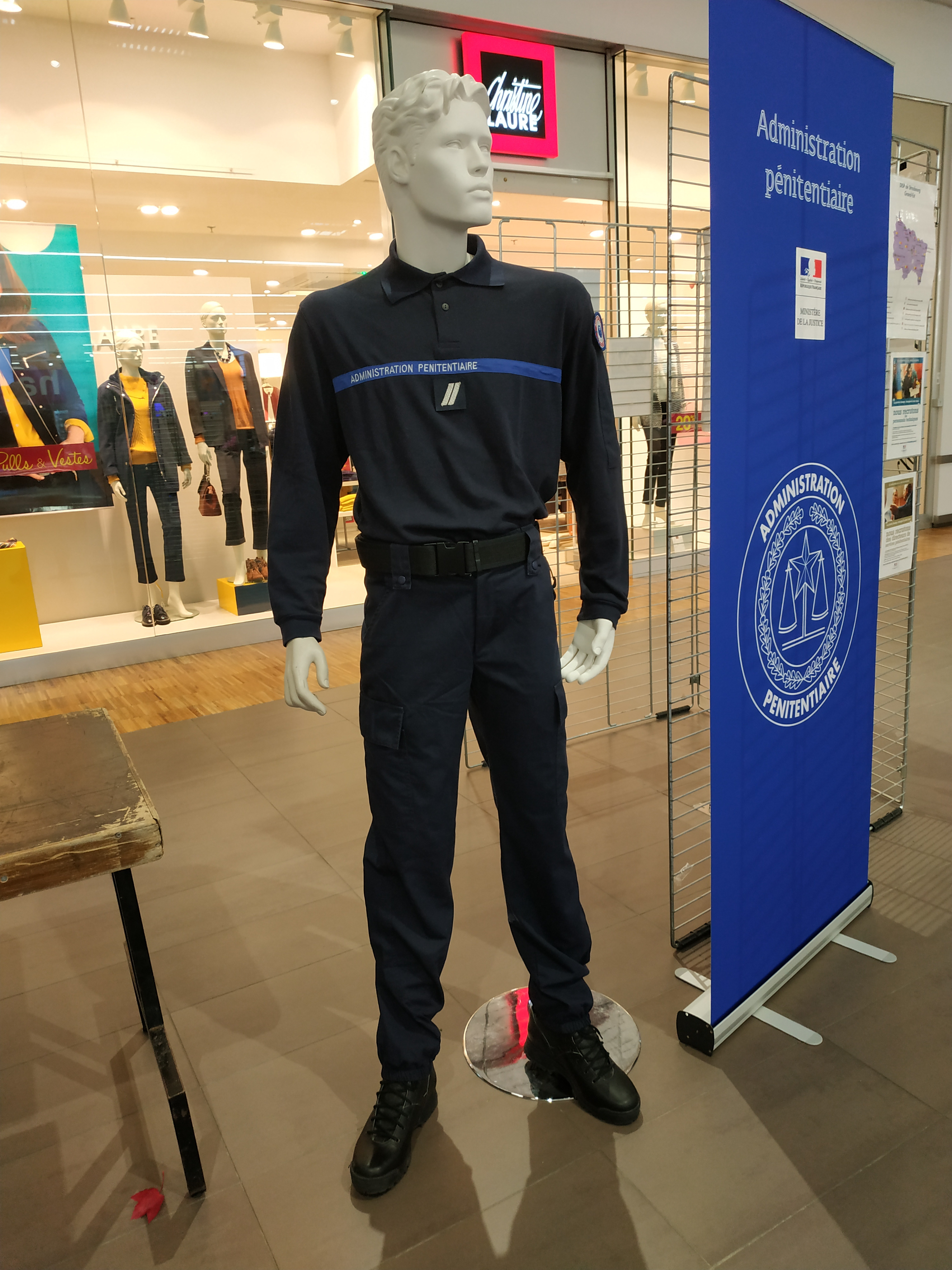 Mannequin portant l'uniforme de l'administration pénitentiaire Photo prise à Mundolsheim dans le cadre des rencontres de la sécurité intérieure de 2019